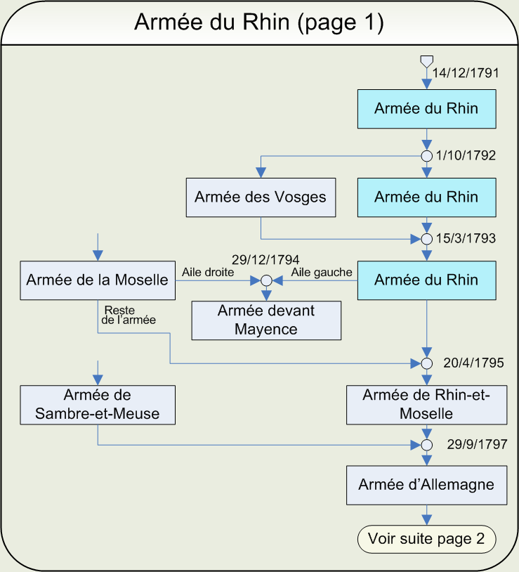 Ordinogramme de l'armée du Rhin (page 1) Dessin réalisé par Papier K